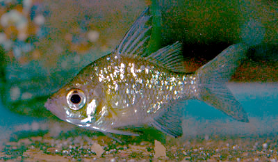 Ambassis macleayi